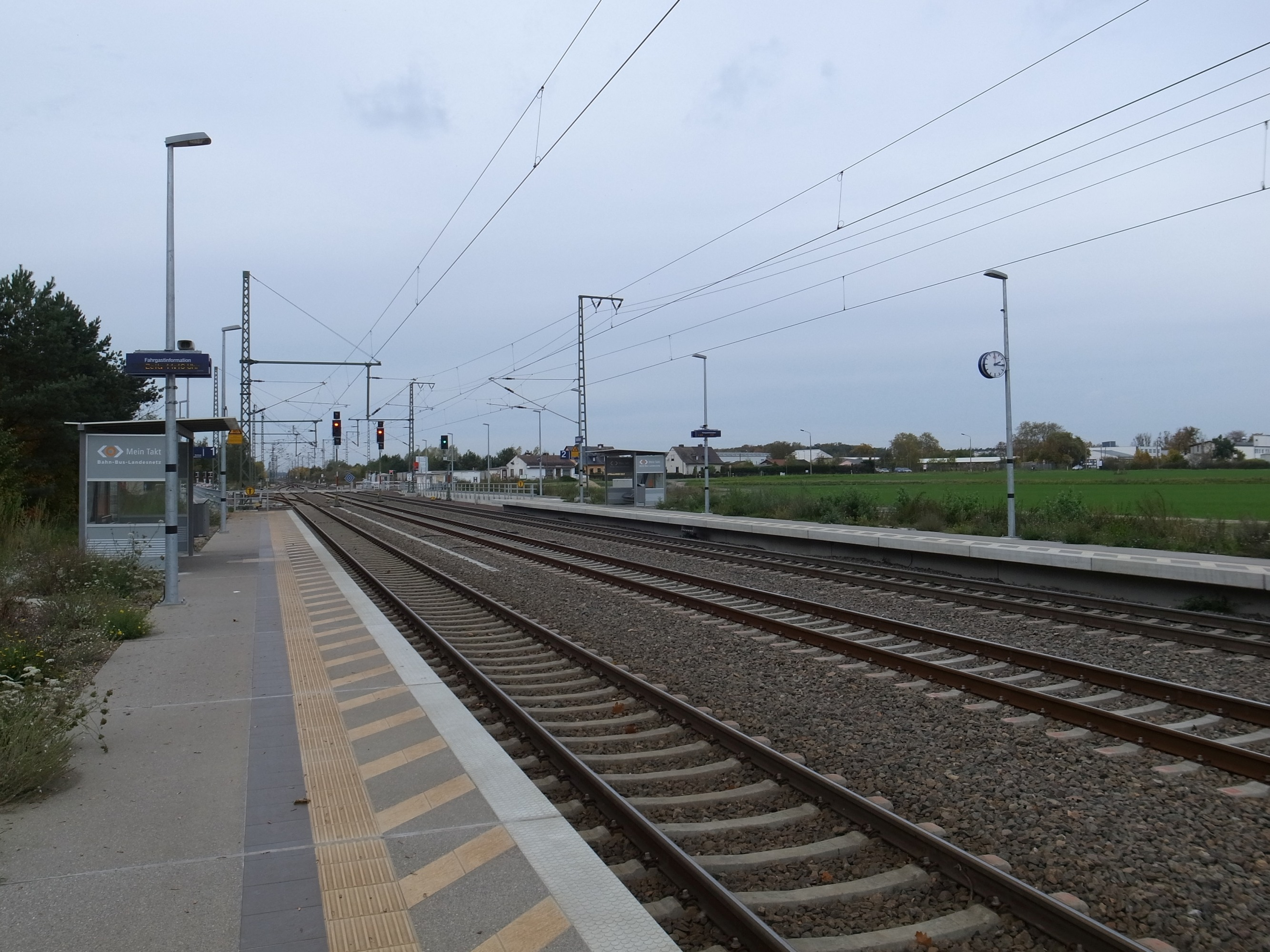 Dessau-Roßlau, Bahnhof im Ortsteil Rodleben.